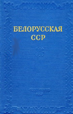 Кнiга Ф.С.Марцінкевіча